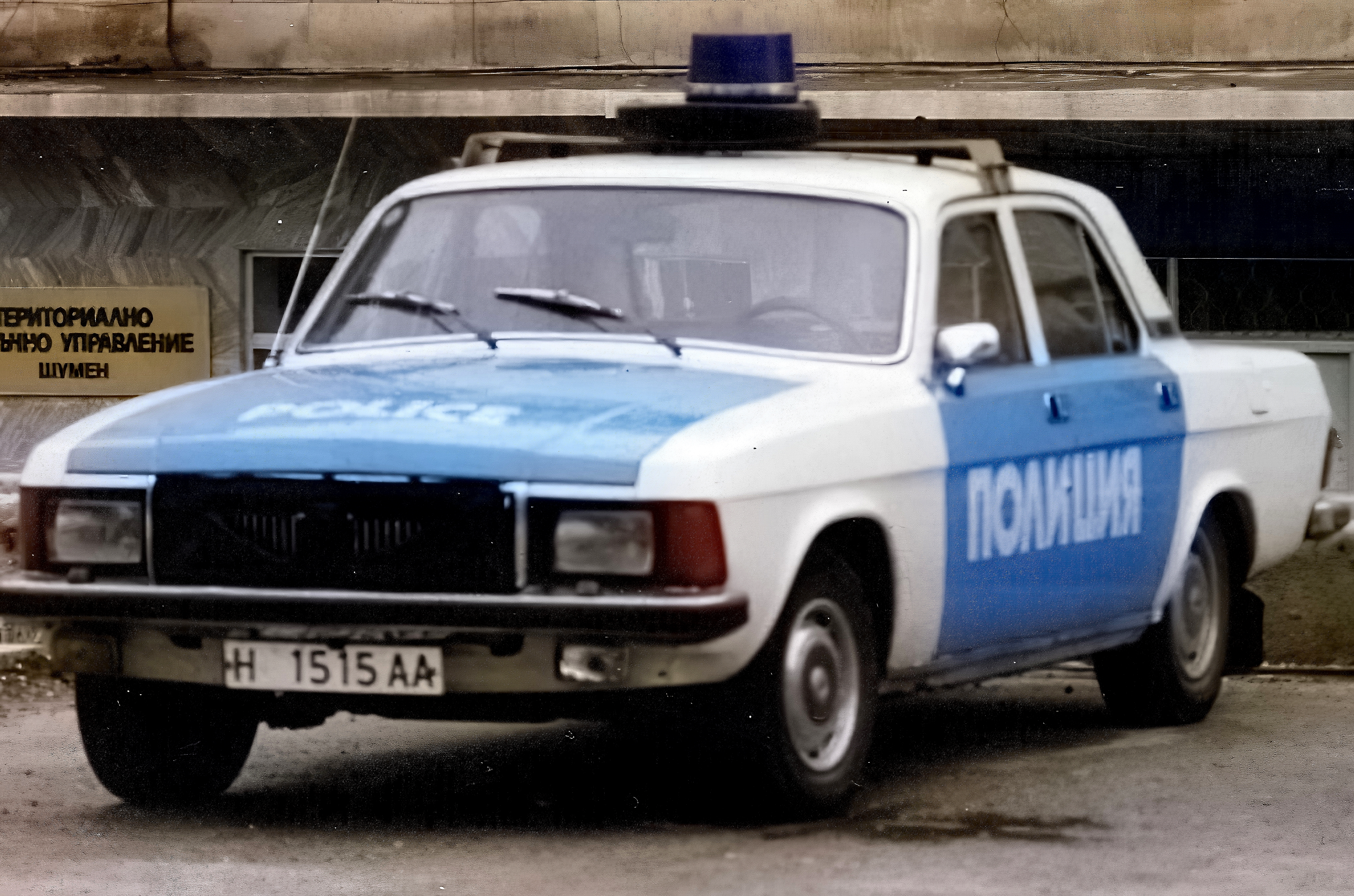 Bulgarian police Volga in Shumen - GAZ-3102.